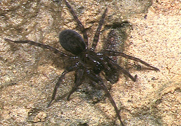 female Iwogumoa yaeyamensis from Okinawa.